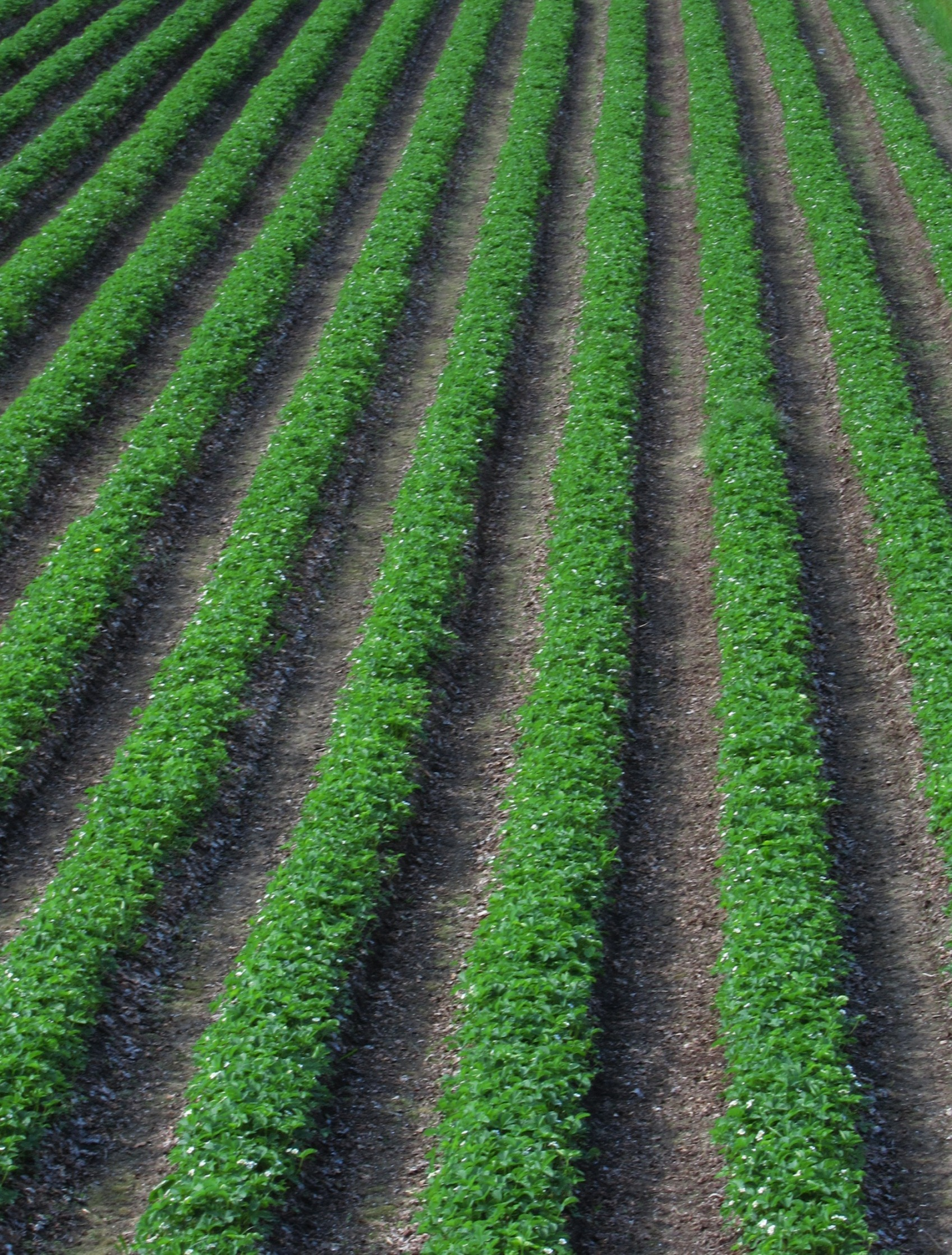 Jordbæråker Valldal Sunnmøre